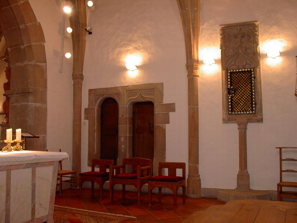 En Deel vum Chouer an der Munzer Kierch. Photo vum User Pear 15:49, 20 August 2006 (UTC). Munzen Kategorie:Gemeng Munzen